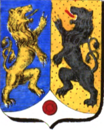 Armes de la famille de Gheldere